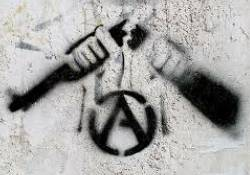 Symbole antimilitariste associé au symbole anarchiste. Pochoir en rue.